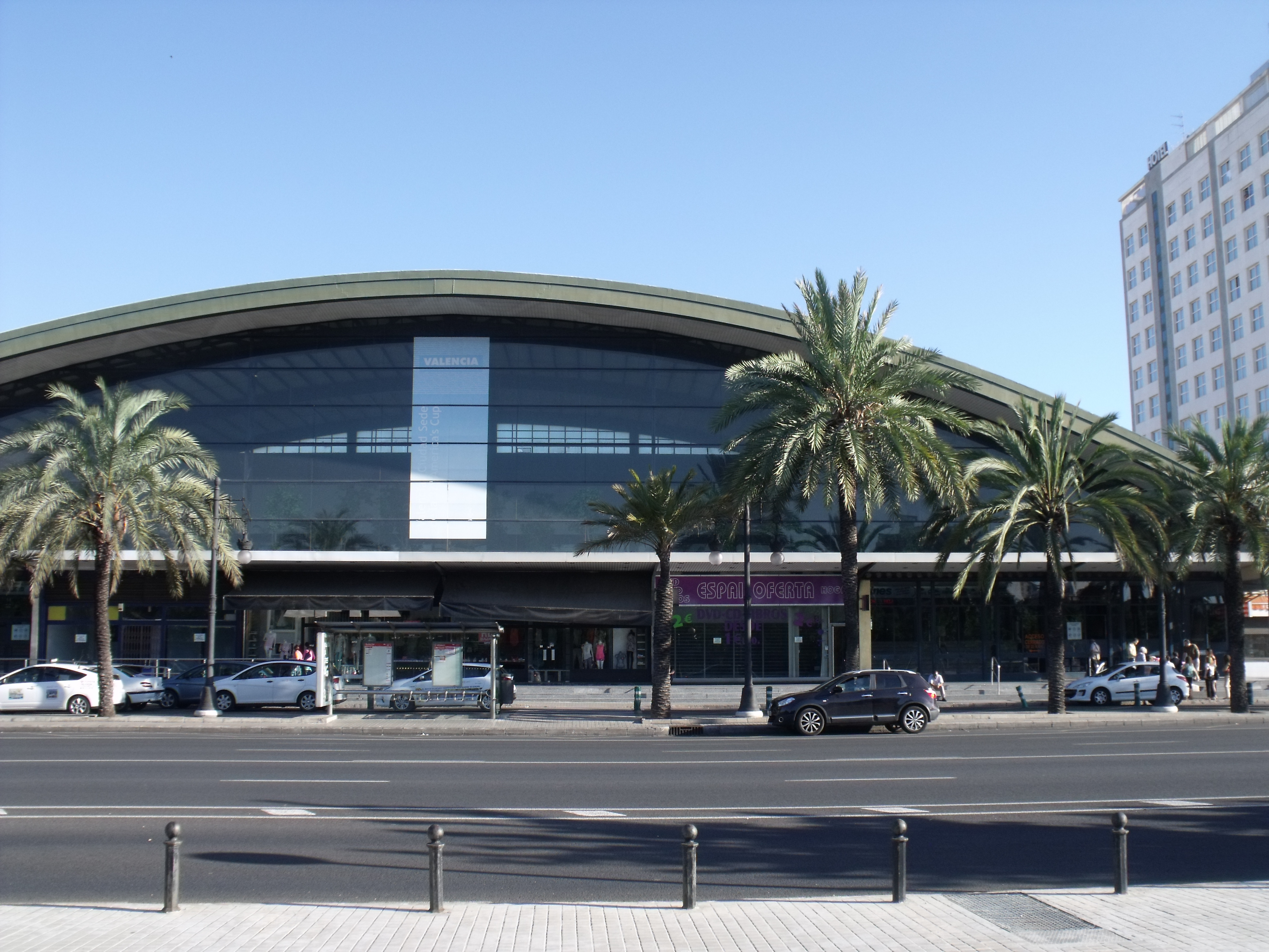 Estación de autobuses de Valencia.